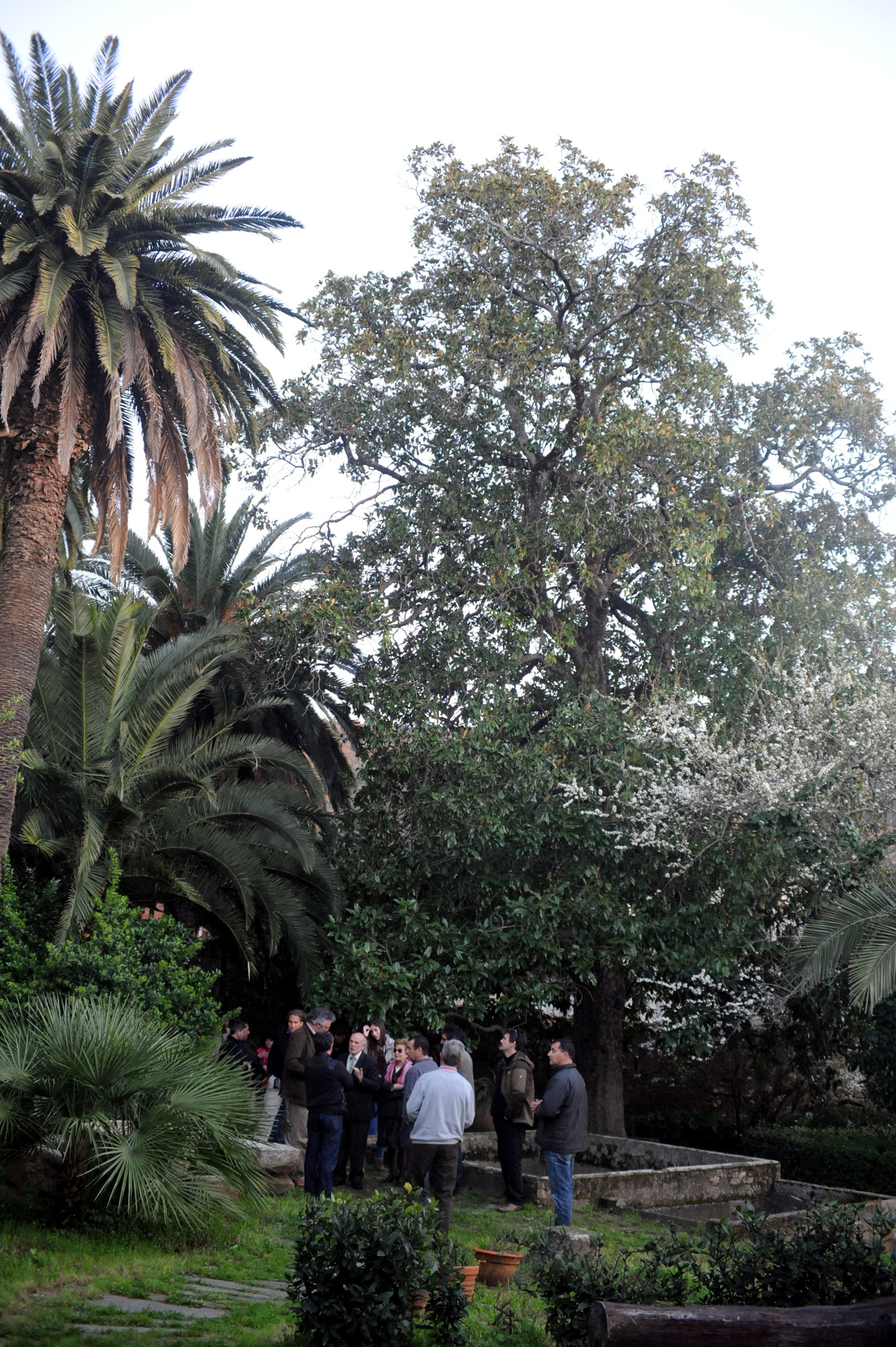 Magnolia de los Durán (Magnolia grandiflora). Árbol singular situado en Villanueva de la Sierra (Cáceres)